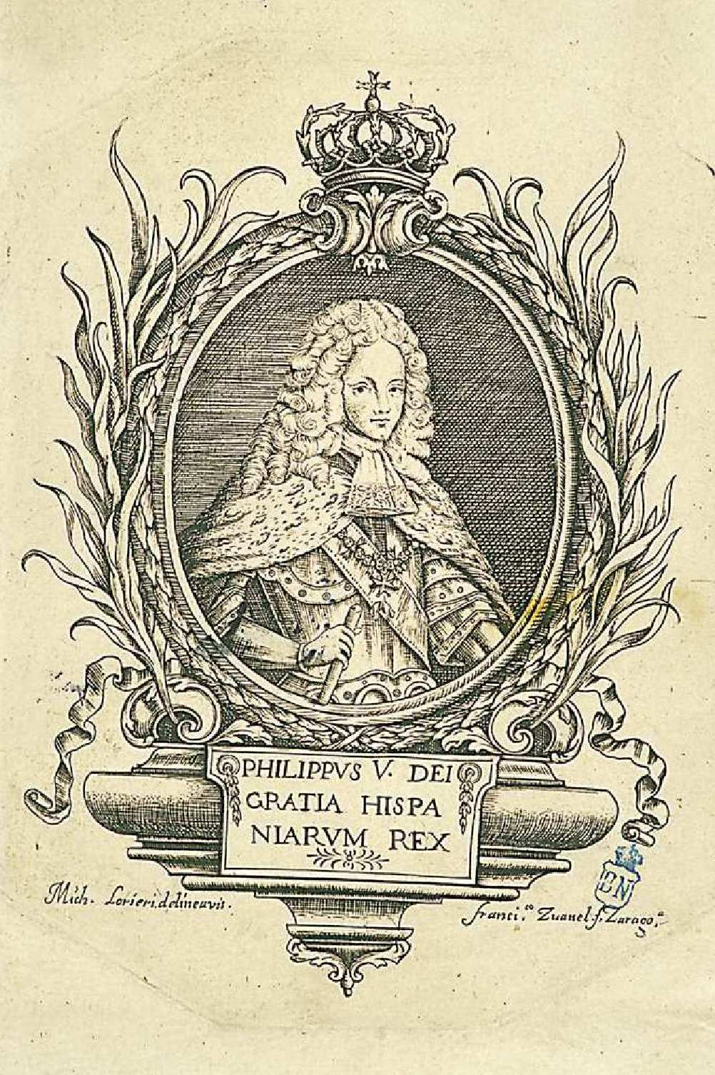 Retrato de Felipe V, grabado calcográfico. Inscripción: "PHILIPPVS V. DEI GRATIA HISPANIARVM REX". Hoja de grabado tras la portada de "Descripcion historico panegirica de las solemnes demonstraciones festivas de la Santa Iglesia Metropolitana y Augusta Ciudad de Zaragoza, en la translacion del Santissimo al Nuevo Gran Templo de Nuestra Señora del Pilar escrita por ... Fr. Ioseph Antonio de Hebrera", Zaragoza, por los heredero de Manuel Román, 1719. De la obra, dedicada a Felipe V, también corresponde a Zudanel